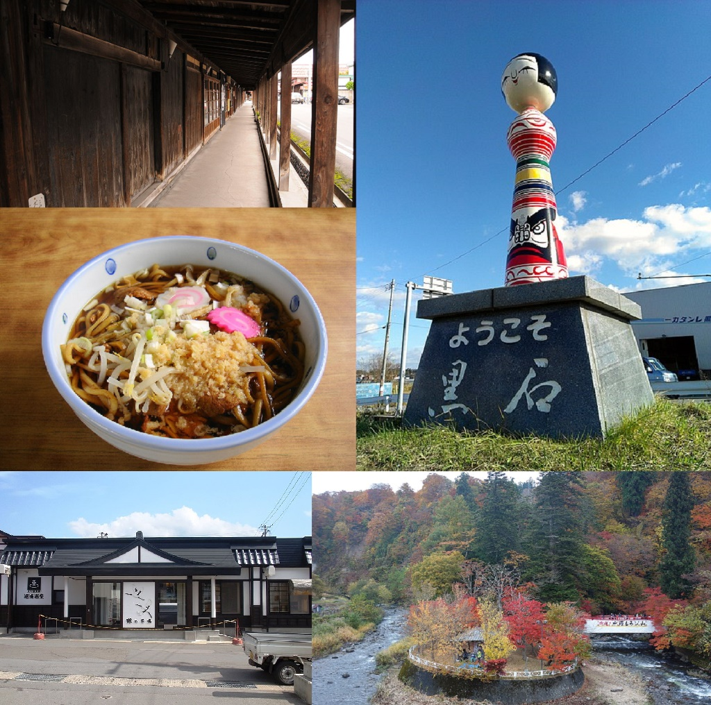 青森県黒石市のモンタージュ画像。